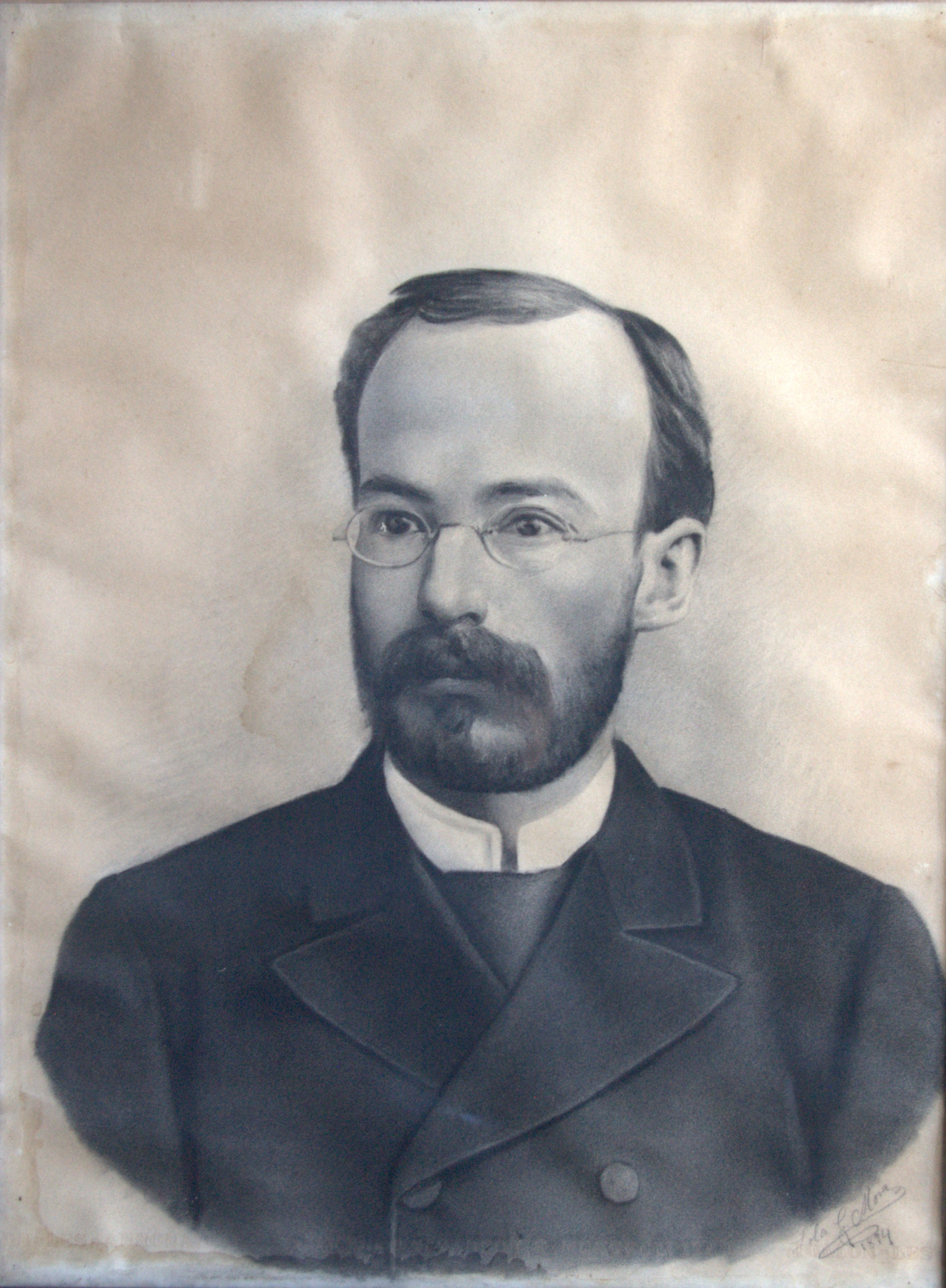 Dibujo hecho por Lola Mora en carbonilla